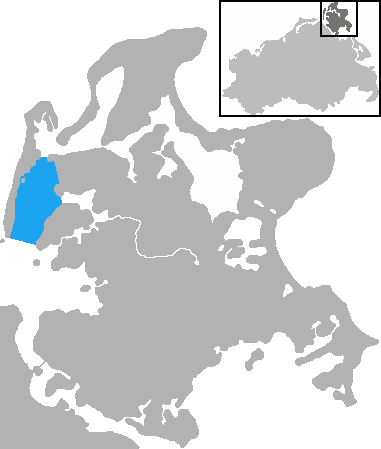 Mecklenburg-Vorpommern, Schaproder Bodden Bay, near Schaprode (marked blue)